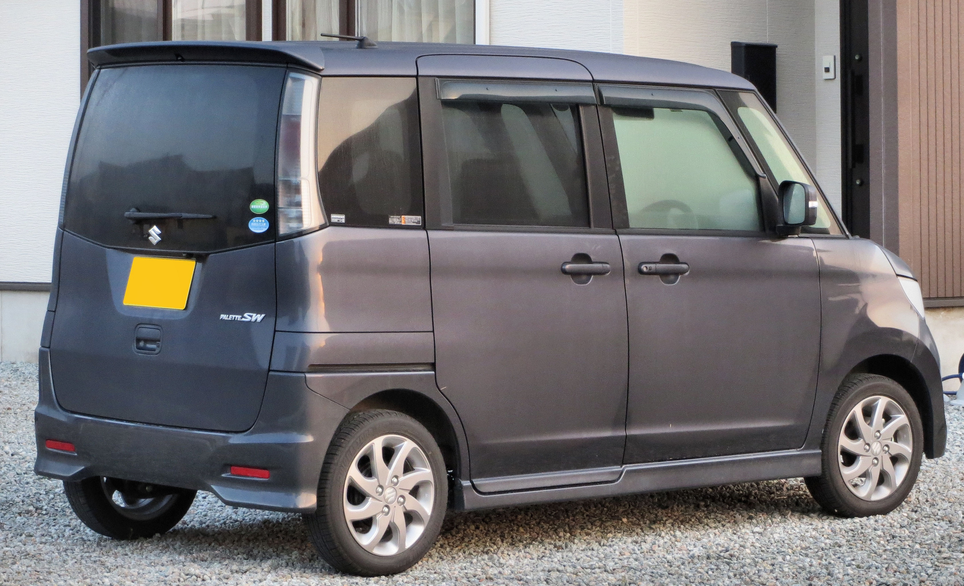 スズキパレットSW リミテッドⅡ